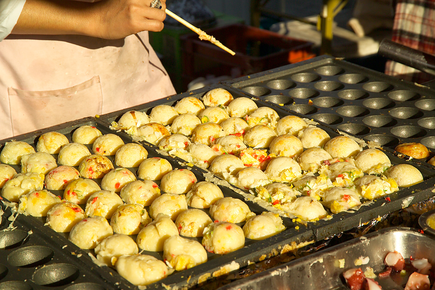 Street vendor in Osaka prepares Takoyaki.